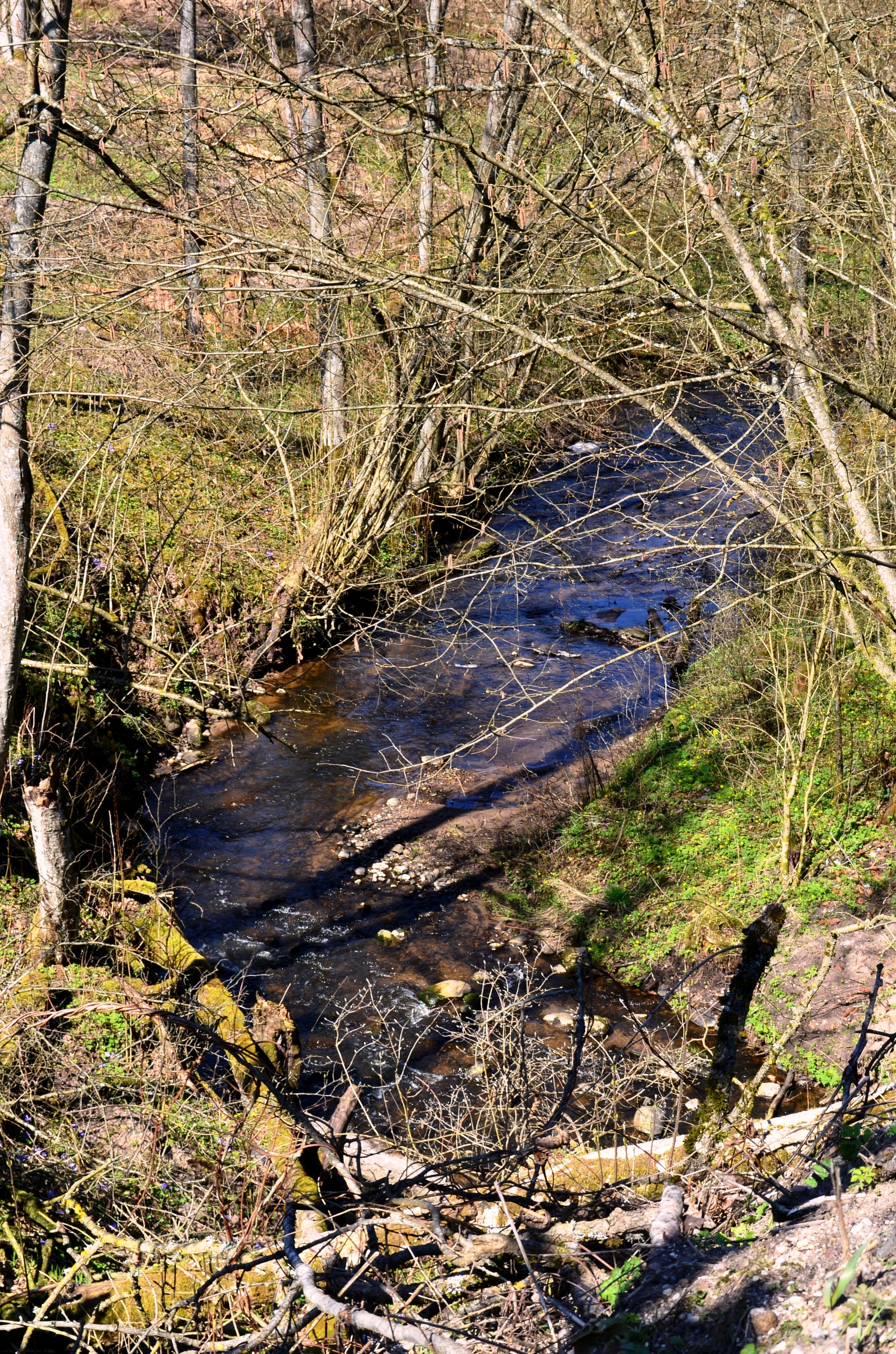 Trinkulio upelis netoli santakos su Bezdone, Bezdonių sen., Vilniaus raj.